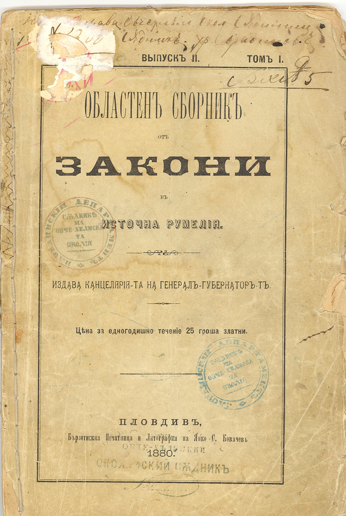 Сборник закони на Източна Румелия.